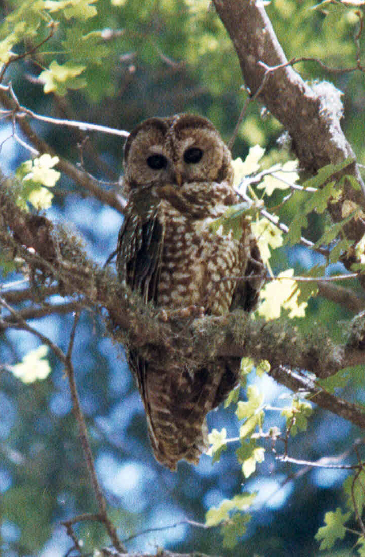 Mexican Spotted Owl Strix occidentalis lucida, Arizona